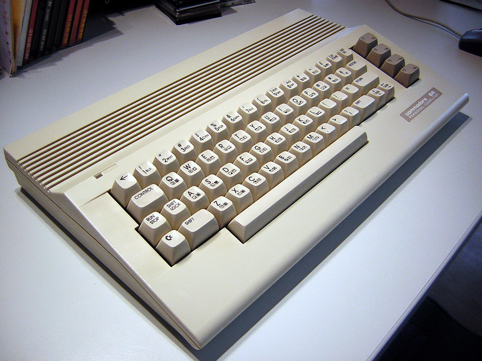 Commodore C64C